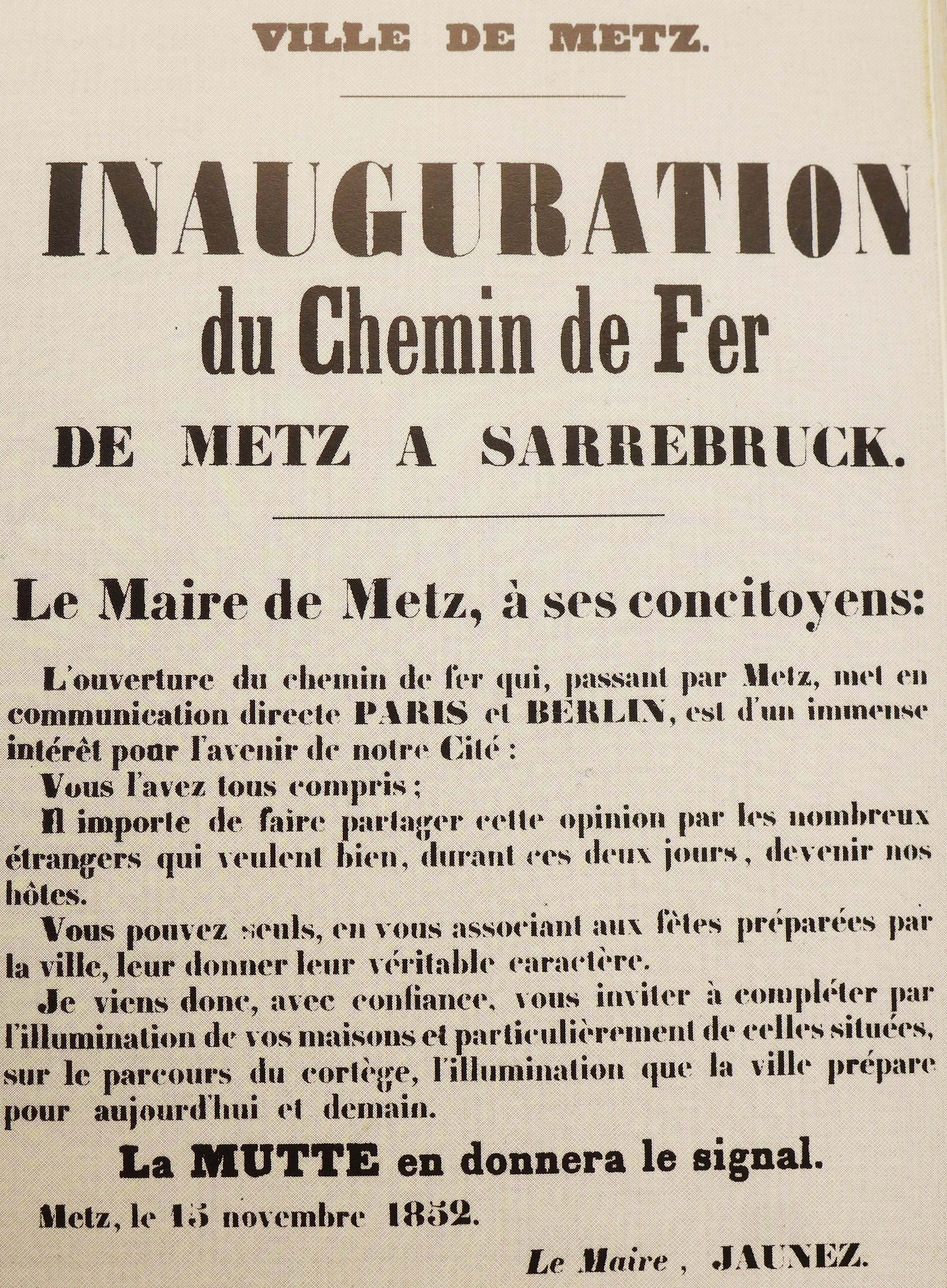 Metz, Einladung an die Bürger von Metz, sich an den Feierlichkeiten zur Einweihung der Eisenbahnverbingung Paris-Metz-Saarbrücken-Berlin zu beteiligen, Plakat von 1852 (Archives municipales de Metz)